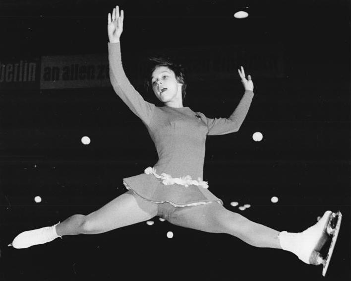 Gabriele Seyfert Zentralbild Kohls 28.1.1962 Deutsche Meisterschaften im Eiskunstlaufen 1962. Die deutschen Eiskunstlauf-Meisterschaften fanden vom 26. - 27.1.1962 in der Berliner Werner-Seelenbinder-Halle statt. UBz: Gabriele Seyfert (SC Wismut Karl-Marx-Stadt) konnte ihren Titel im Eiskunstlauf der Damen erfolgreich verteidigen.